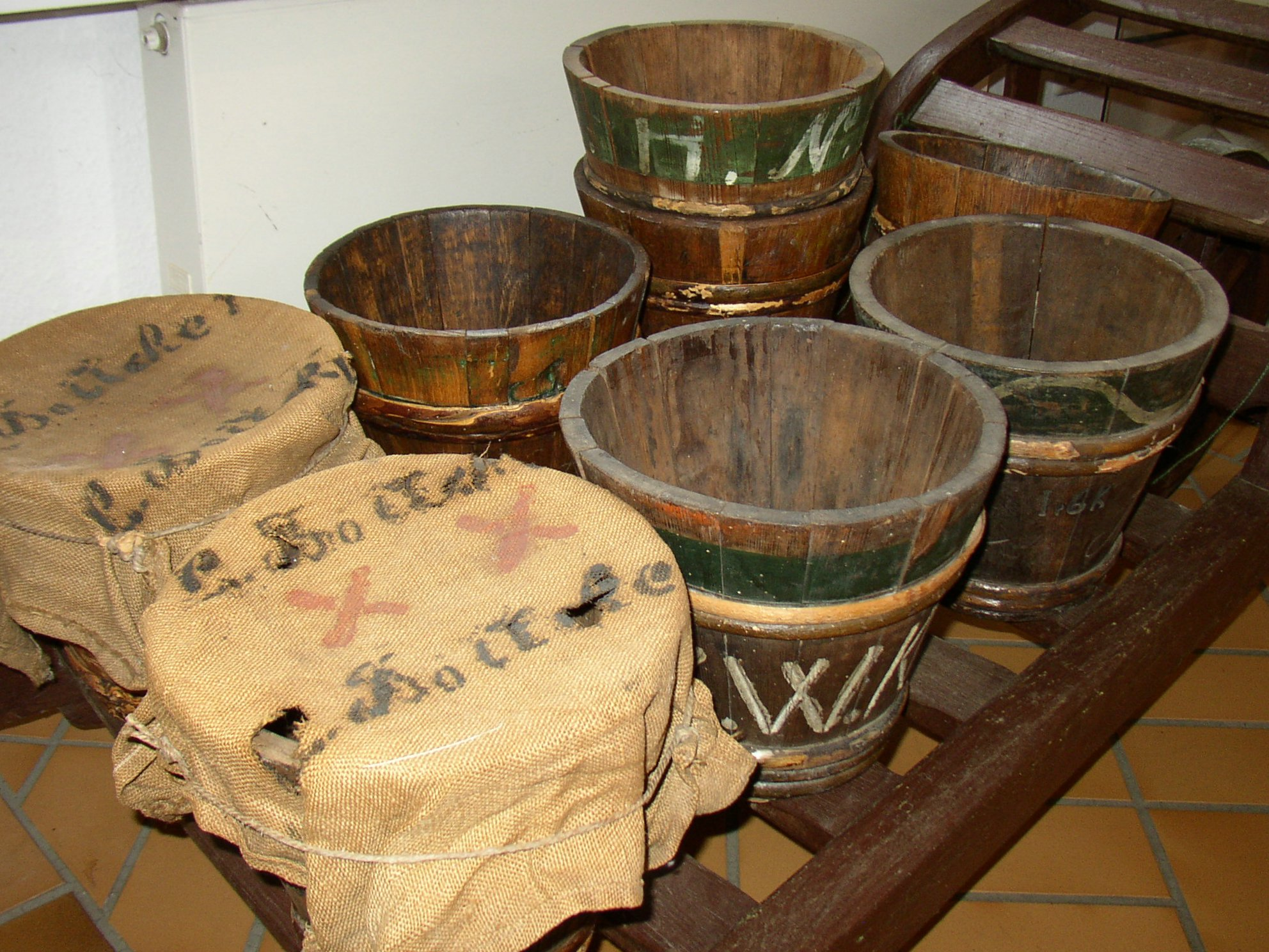 Obsttiene, wooden fruitcontainer